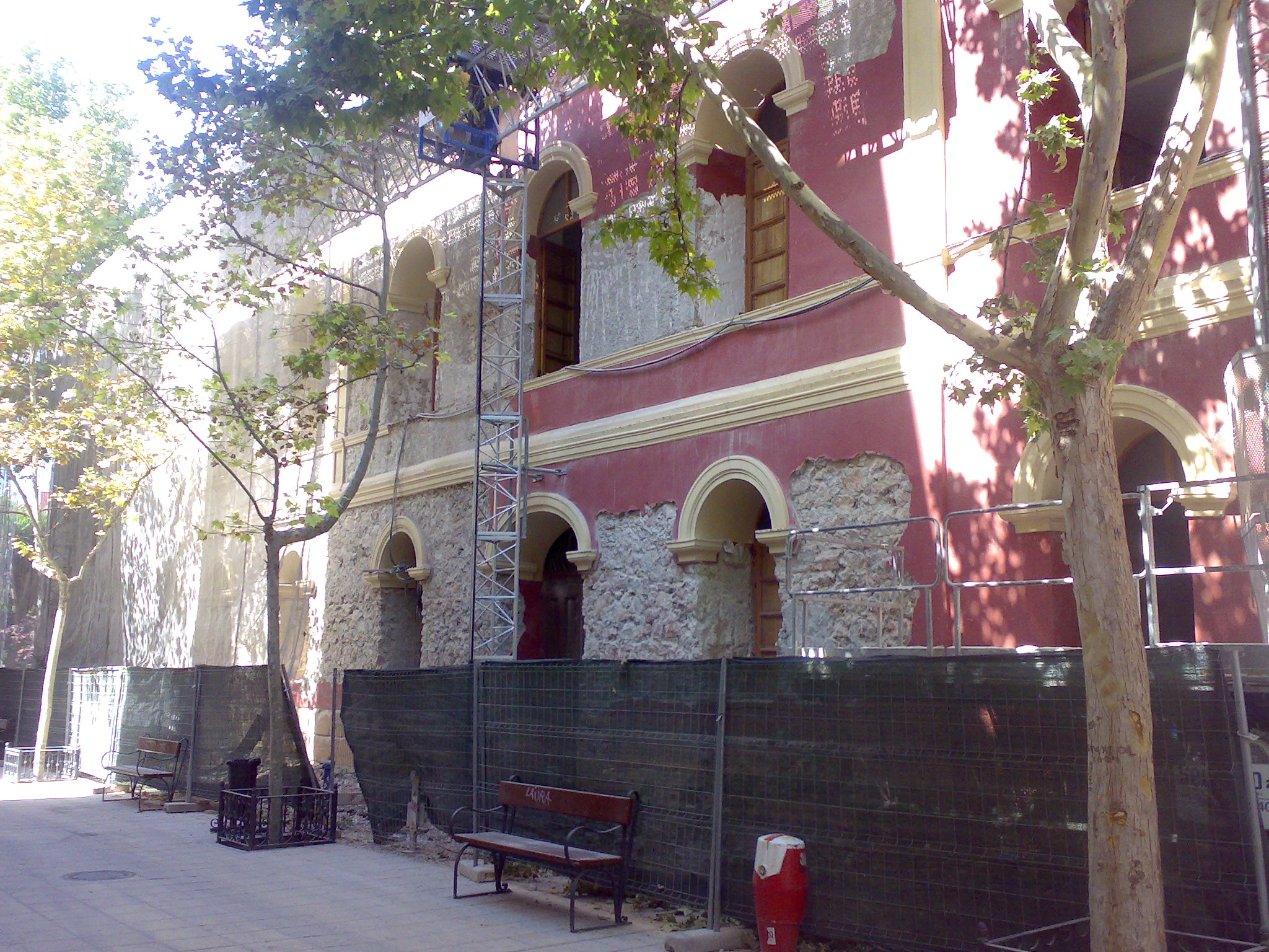 Restauración de uno de los laterales del Teatro Guerra en Lorca (Murcia).